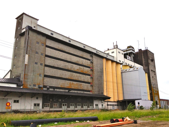 Lagerhuset i Vara, Vara kommun, Västergötland, 2012